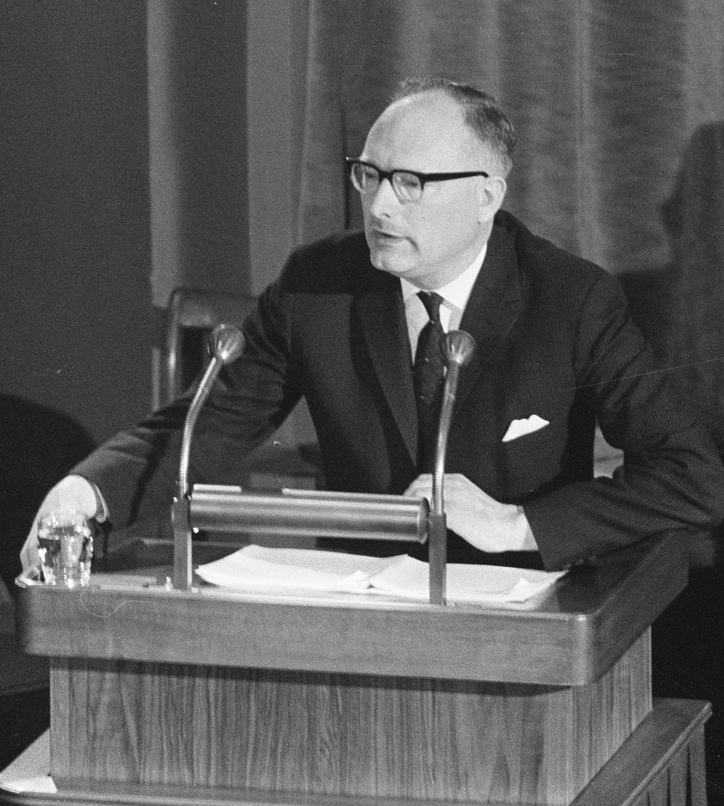 Mammoetwet in de Eerste Kamer, Van Hulst (CHU) aan het woord